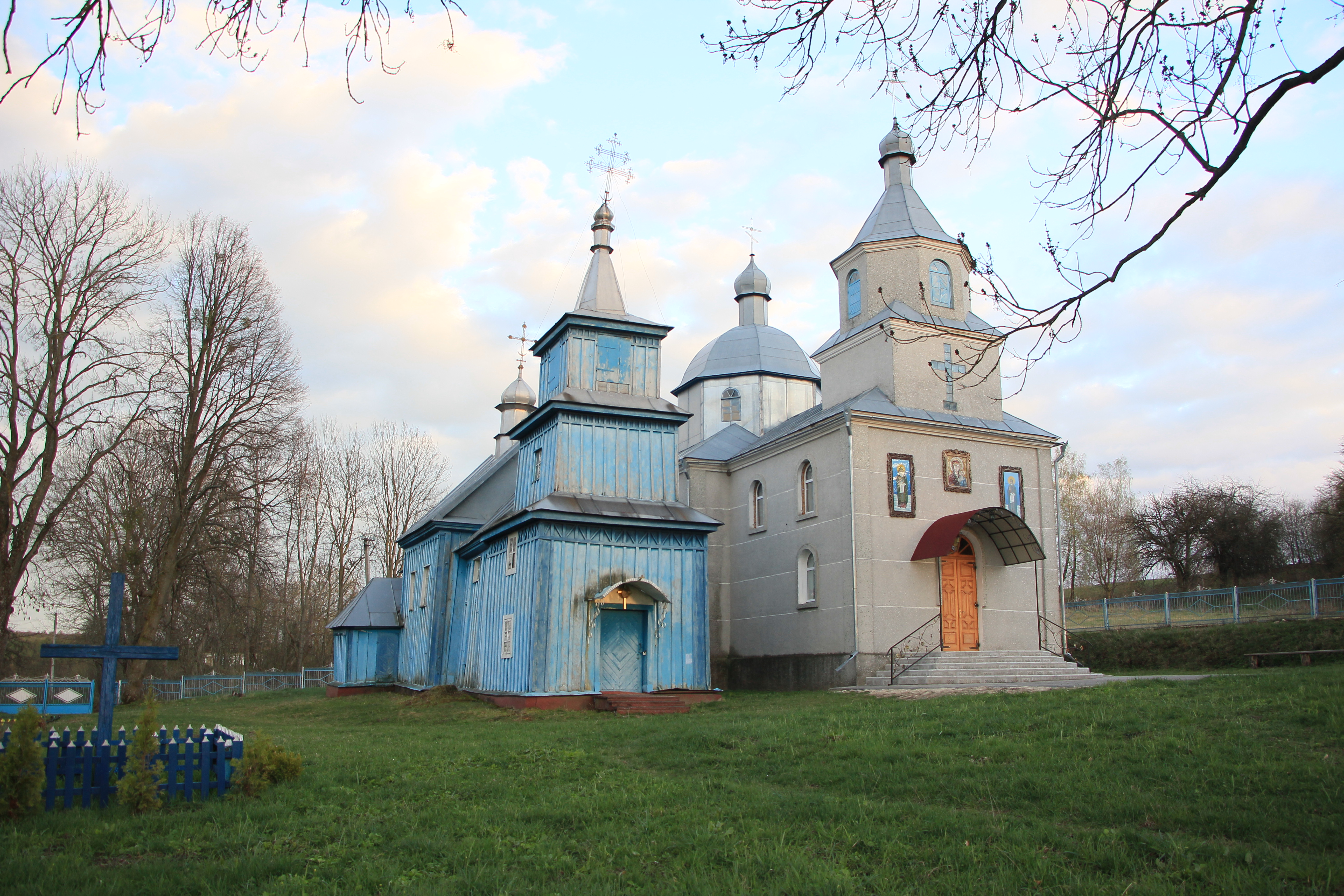 Дерев'яна церква в селі Малі Садки Шумського району, Тернопільської області